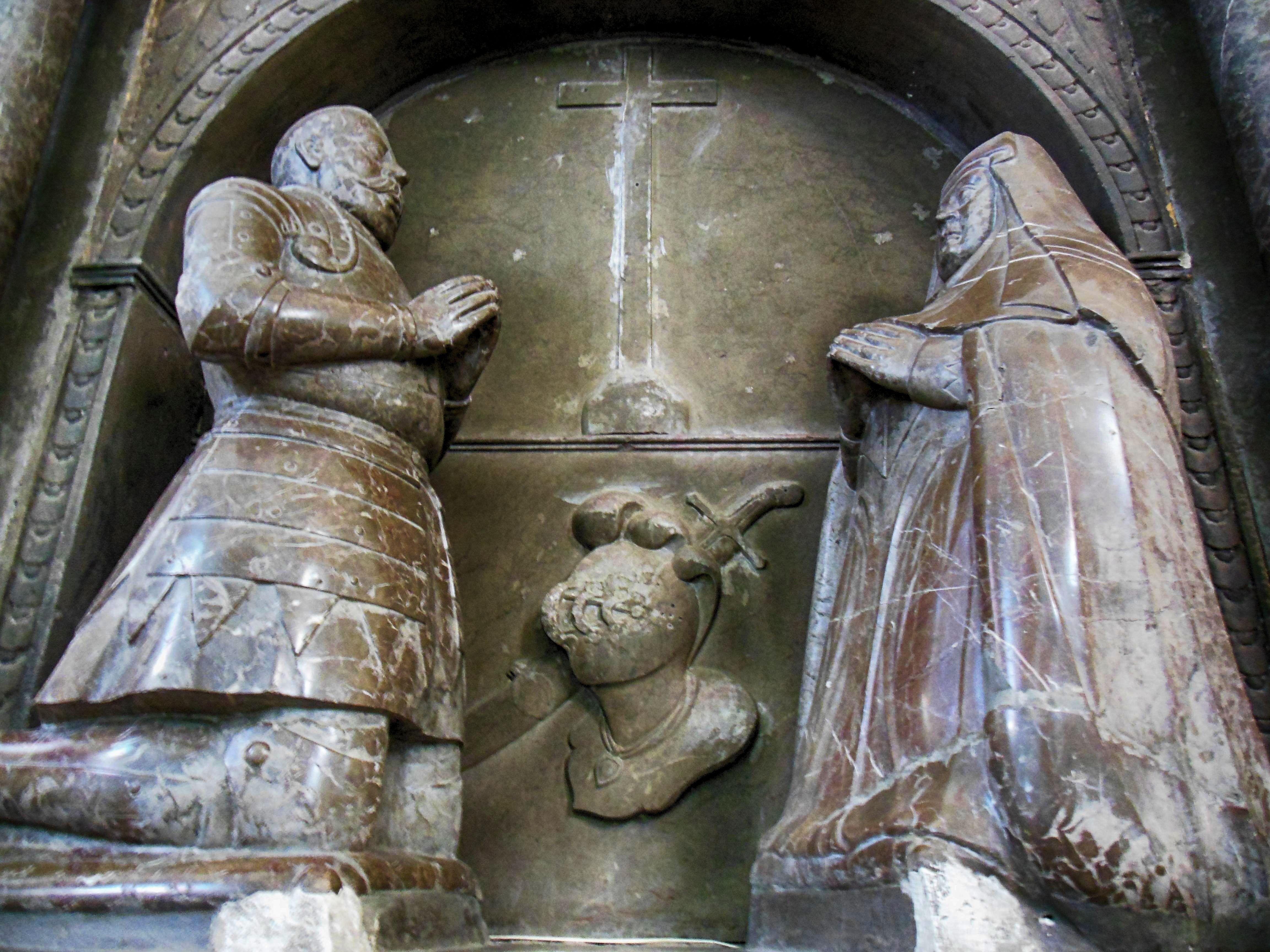 Беларуская (тарашкевіца): Касьцёл Сьв. Юрыя:дэкаратыўнае аздабленьне інтэр’ера касьцёла: галоўны алтар, бакавыя алтары, амбонуваходныя дзьверы надмагільны помнік Вольскіх. в. Крамяніца This is a photo of Belarusian heritage monument. Reference number: 412Г000273 ( WLM)